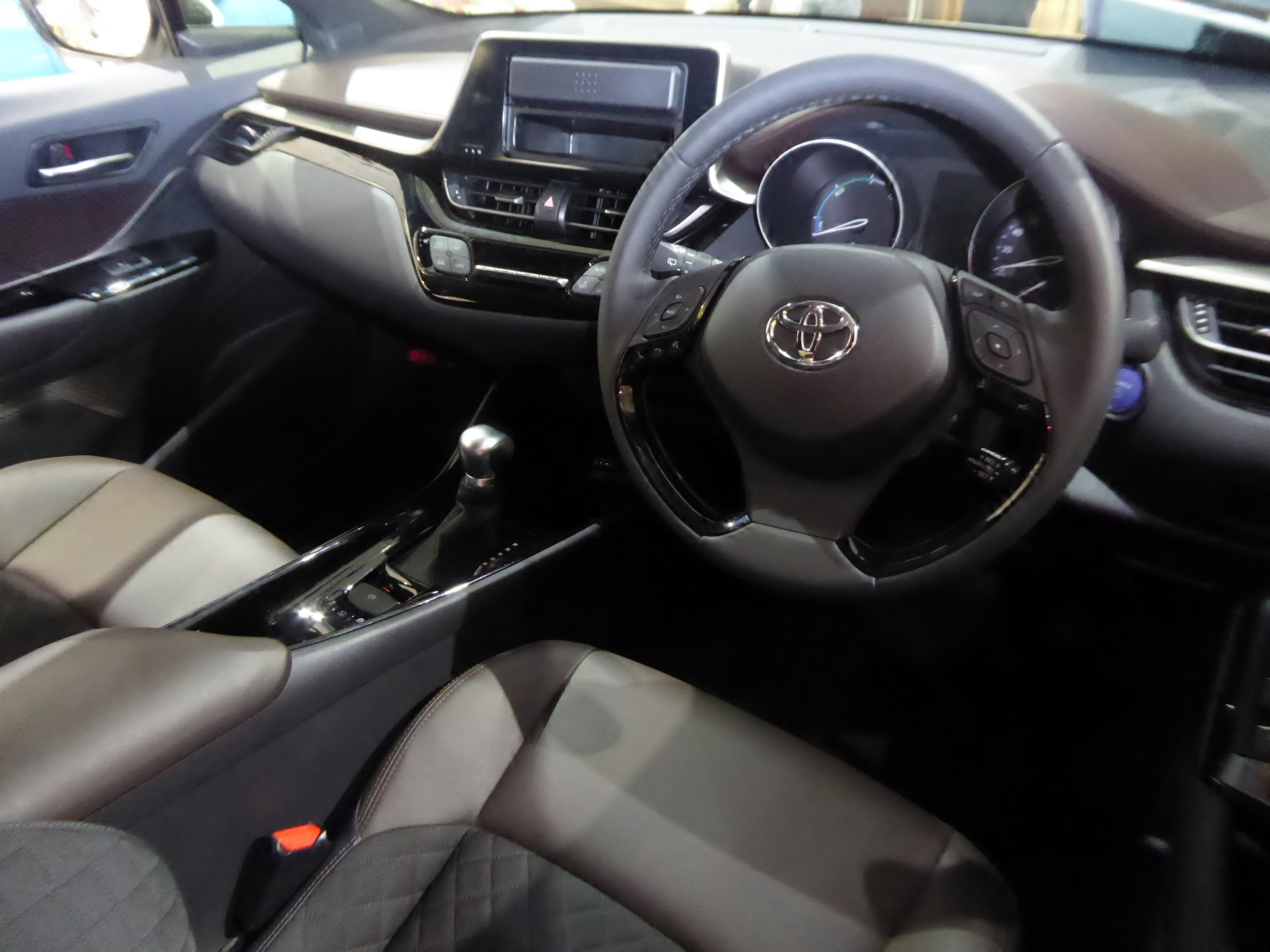 DAA-ZYX10型トヨタ・C-HR Gのインテリアを撮影。